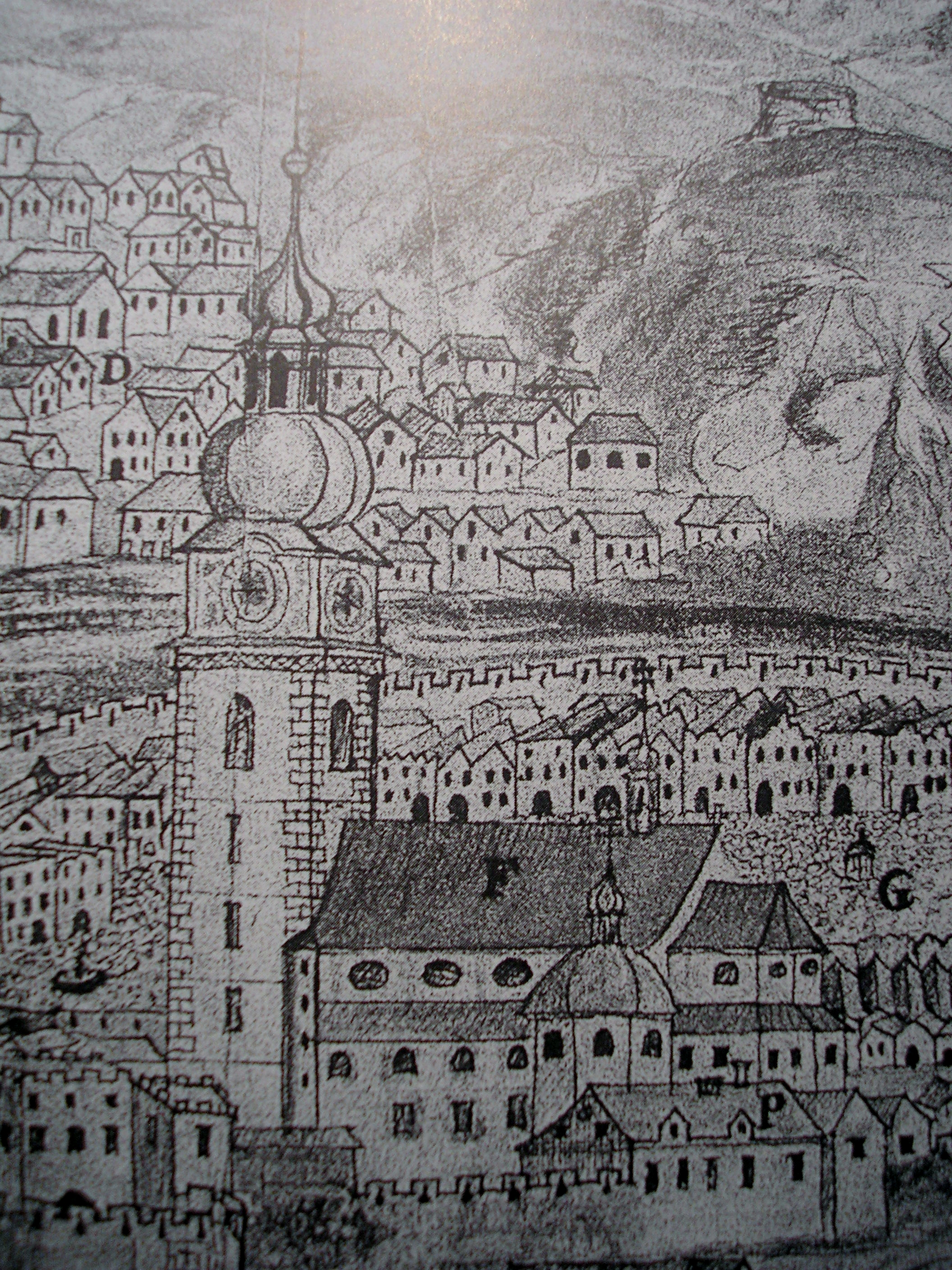 Městská věž v Třebíči v detailu kresby města z počátku 18. století